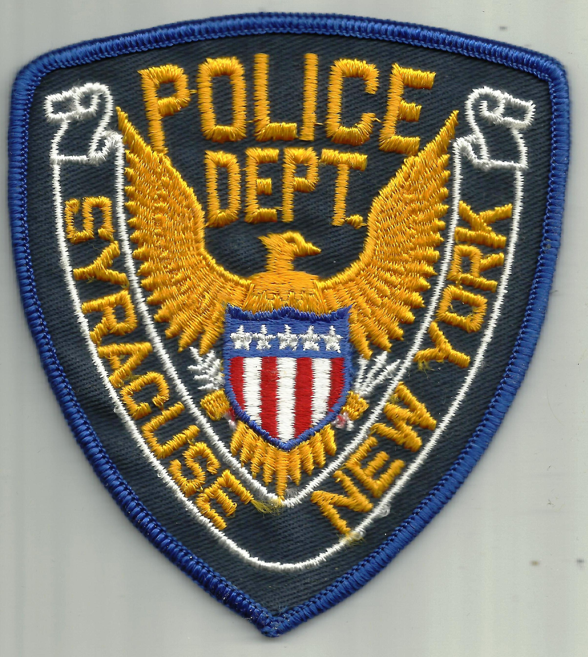 USA - NEW YORK - Syracuse police dept.